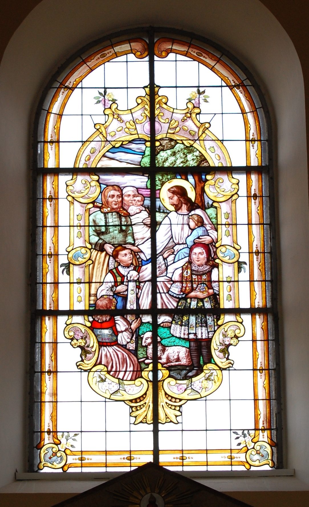 Skleněná vitráž v Ratíškovickém kostele